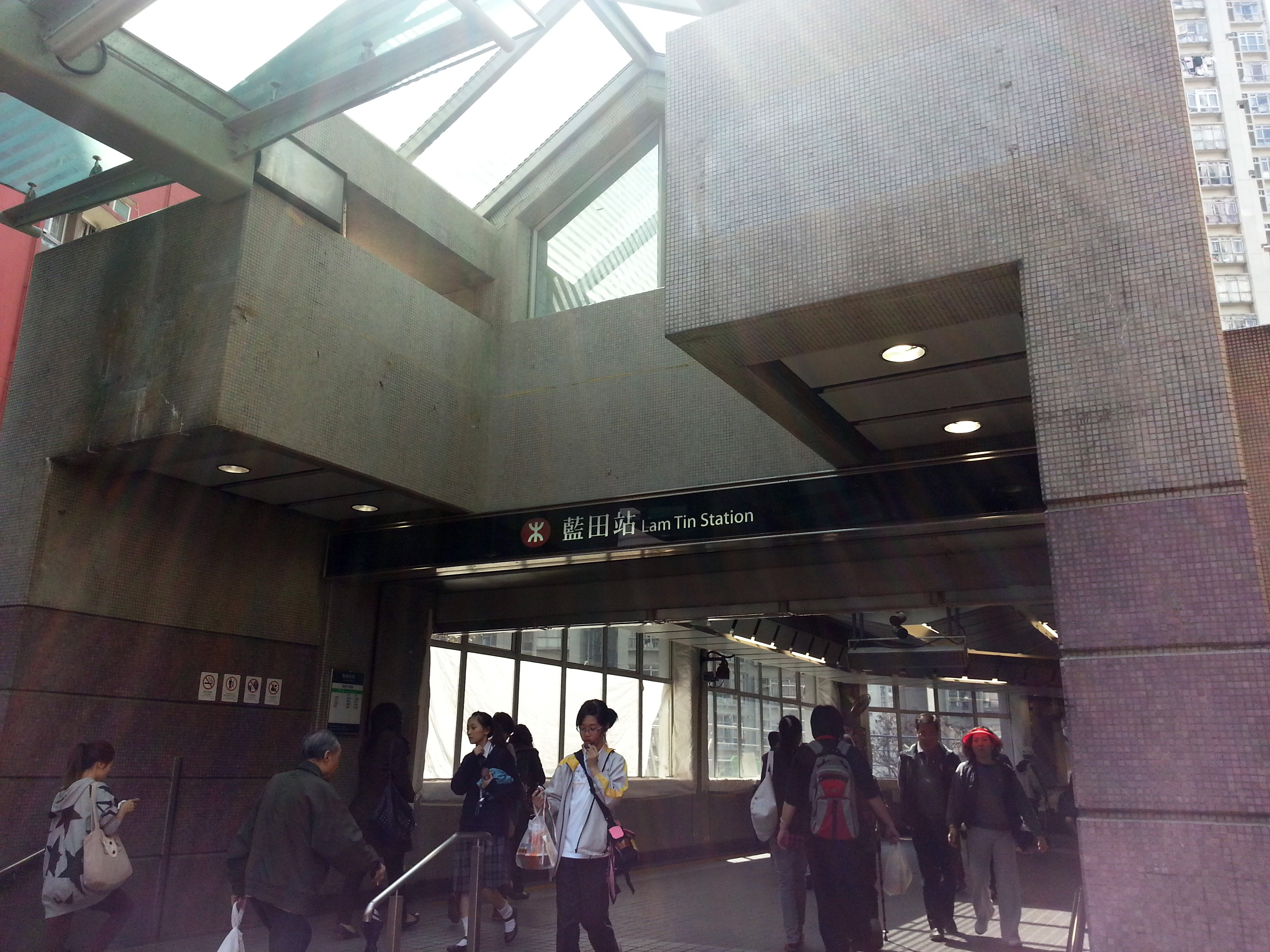 港鐵藍田站A出口